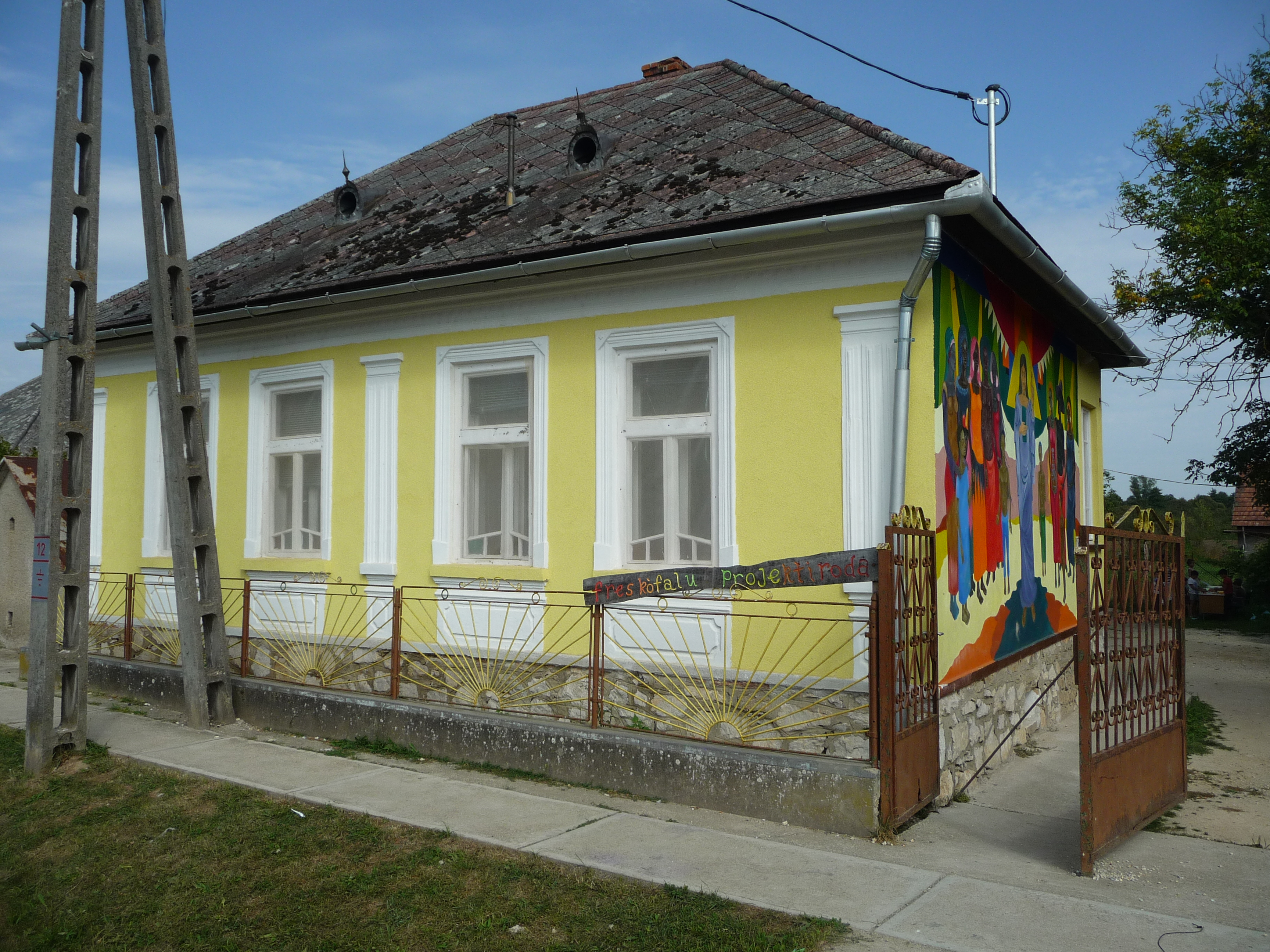 A Magyar Református Szeretetszolgálat Közhasznú Alapítvány projektirodája